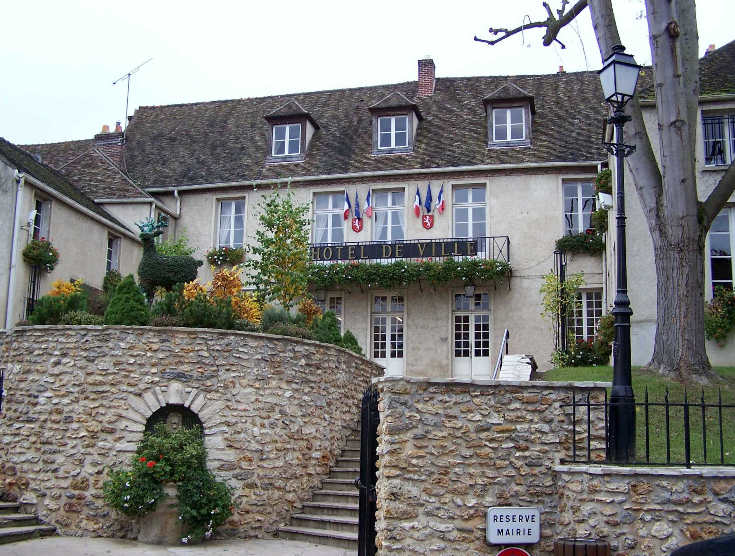 Hôtel de ville de Montfort-l'Amaury (Yvelines, France)